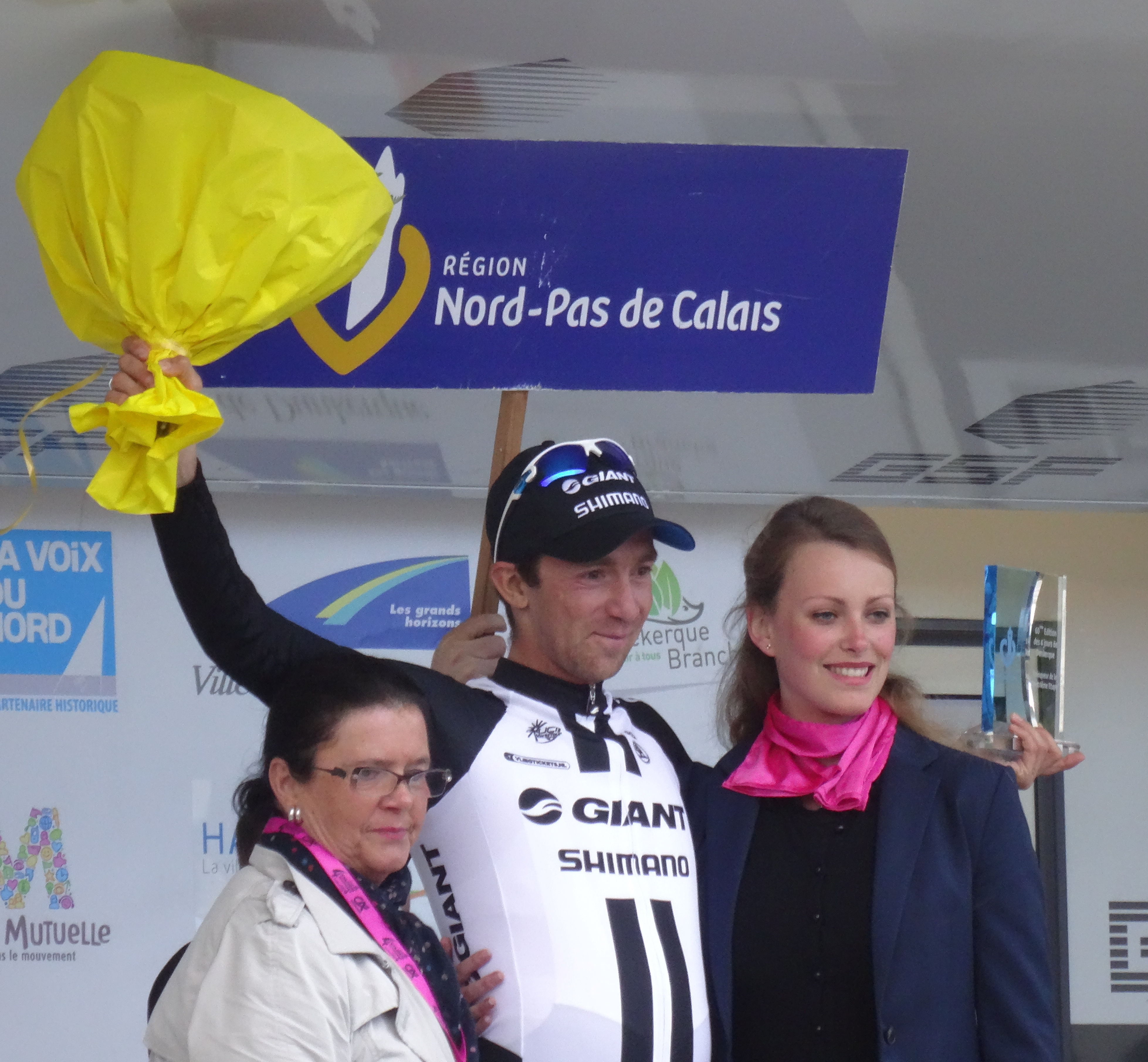 Reportage photographique réalisé le samedi 10 mai 2014 à l'arrivée de la quatrième étape de l'édition 2014 des Quatre jours de Dunkerque à Licques, Pas-de-Calais, Nord-Pas-de-Calais, France. Depicted person: Thierry Hupond Depicted team: Giant-Shimano